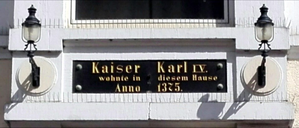 Kaiser Karl IV wohnte in diesem Hause Anno 1375